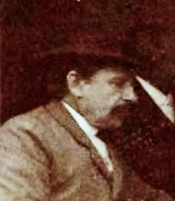 [Collection Jules Beau. Photographie sportive] : T. 10. Année 1899 / Jules Beau : F. 33v. [Poids lourds]